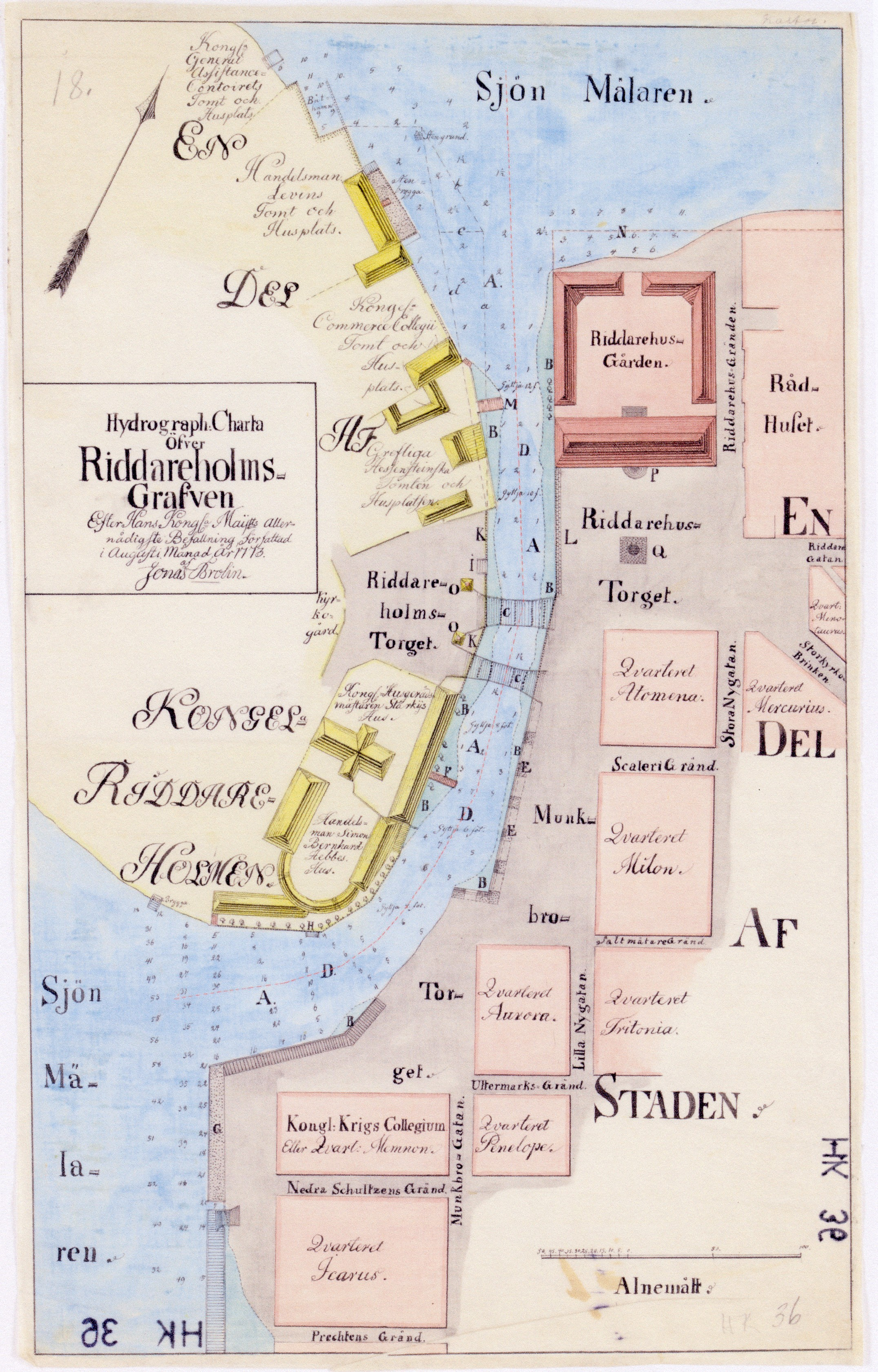 Hydrografisk karta över Ridderholmskanalen ("Riddareholms-Grafven") i Stockholm